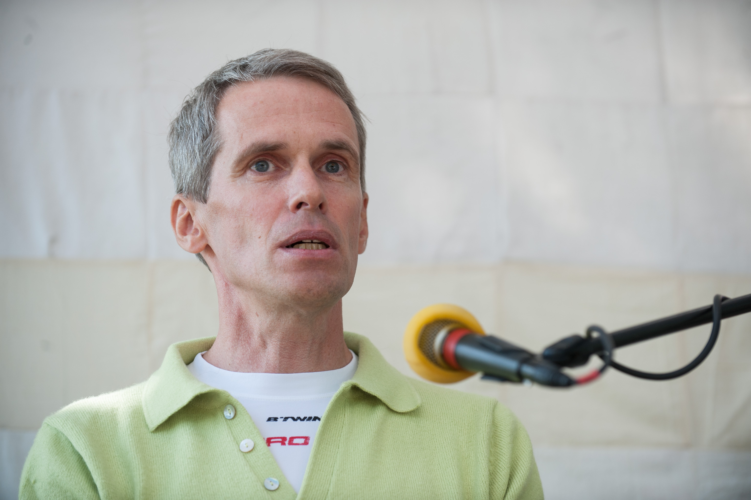 Arvamusfestival 2014: "Kas dopinguvabasport on võimalik?"